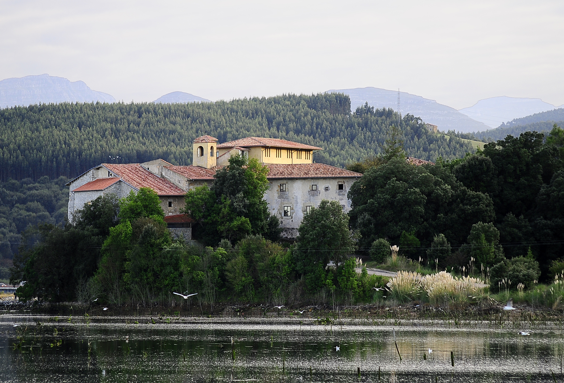 Monasterio San Sebastián de Hano (y la marisma), Escalante, Cantabria, España